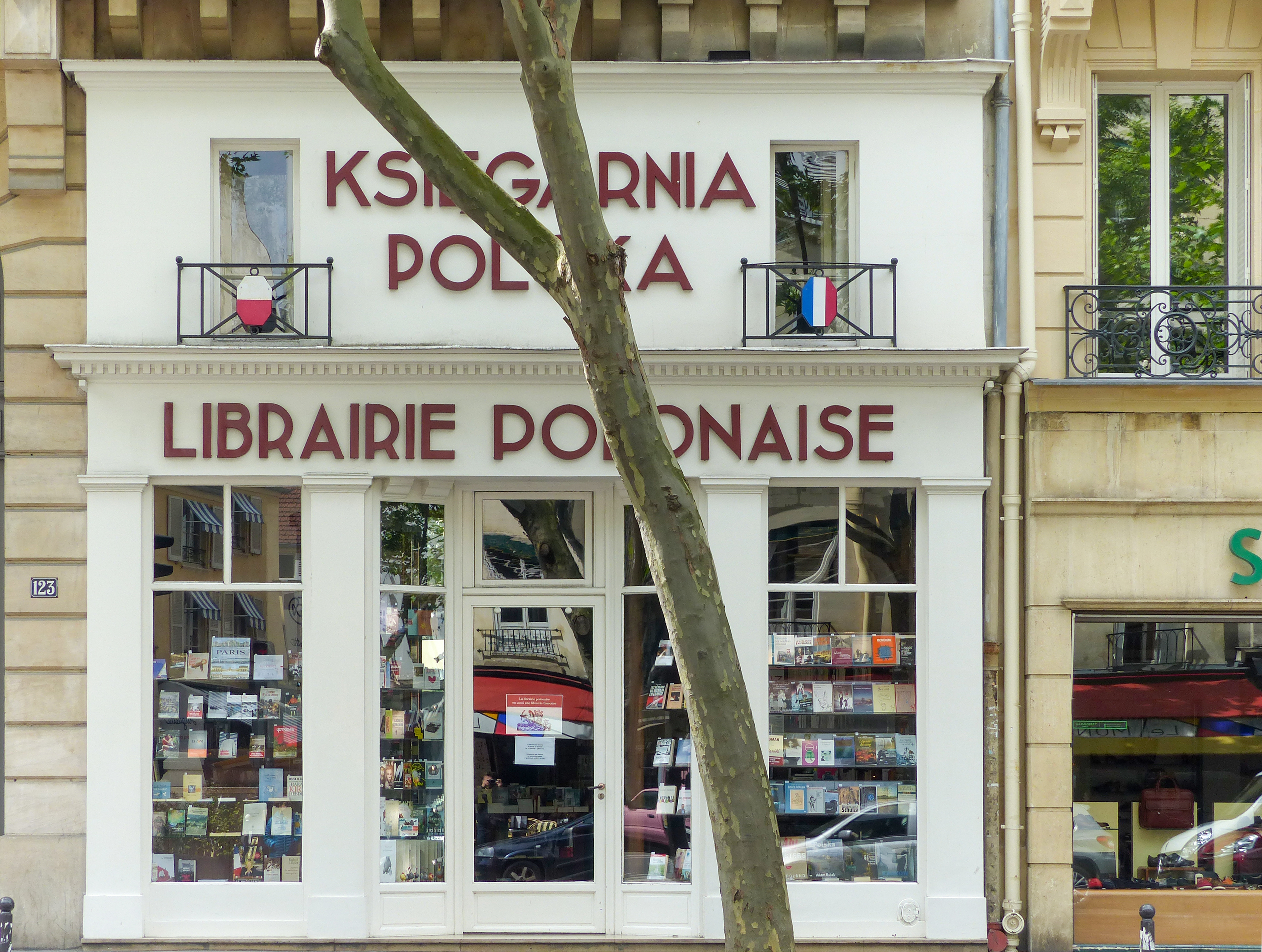 Księgarnia Polska w Paryżu. 2016.05.15. (fr: Librairie polonaise de Paris, en: Polish Library of Paris).